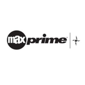 Logo MaxPrime *e